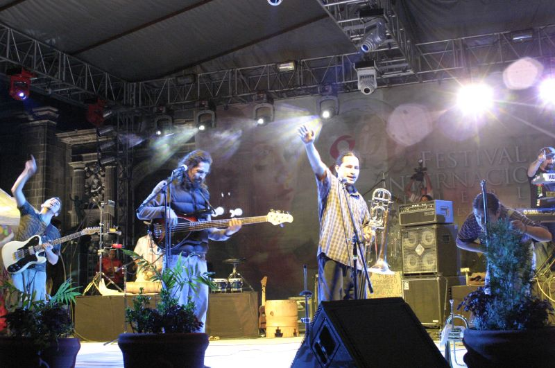 Rastrillos en 2006.